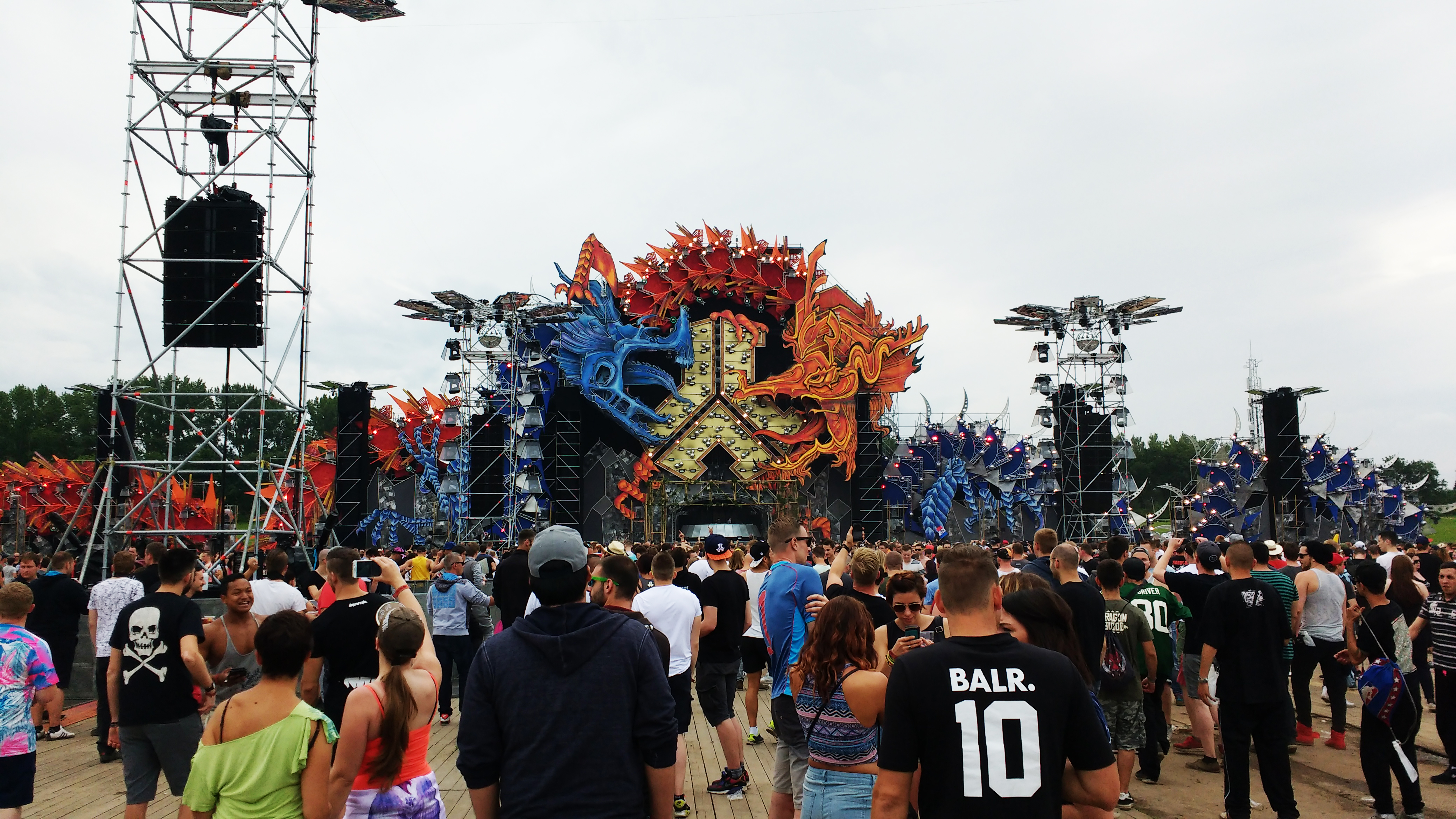 Mainstage DEFQON.1 2016